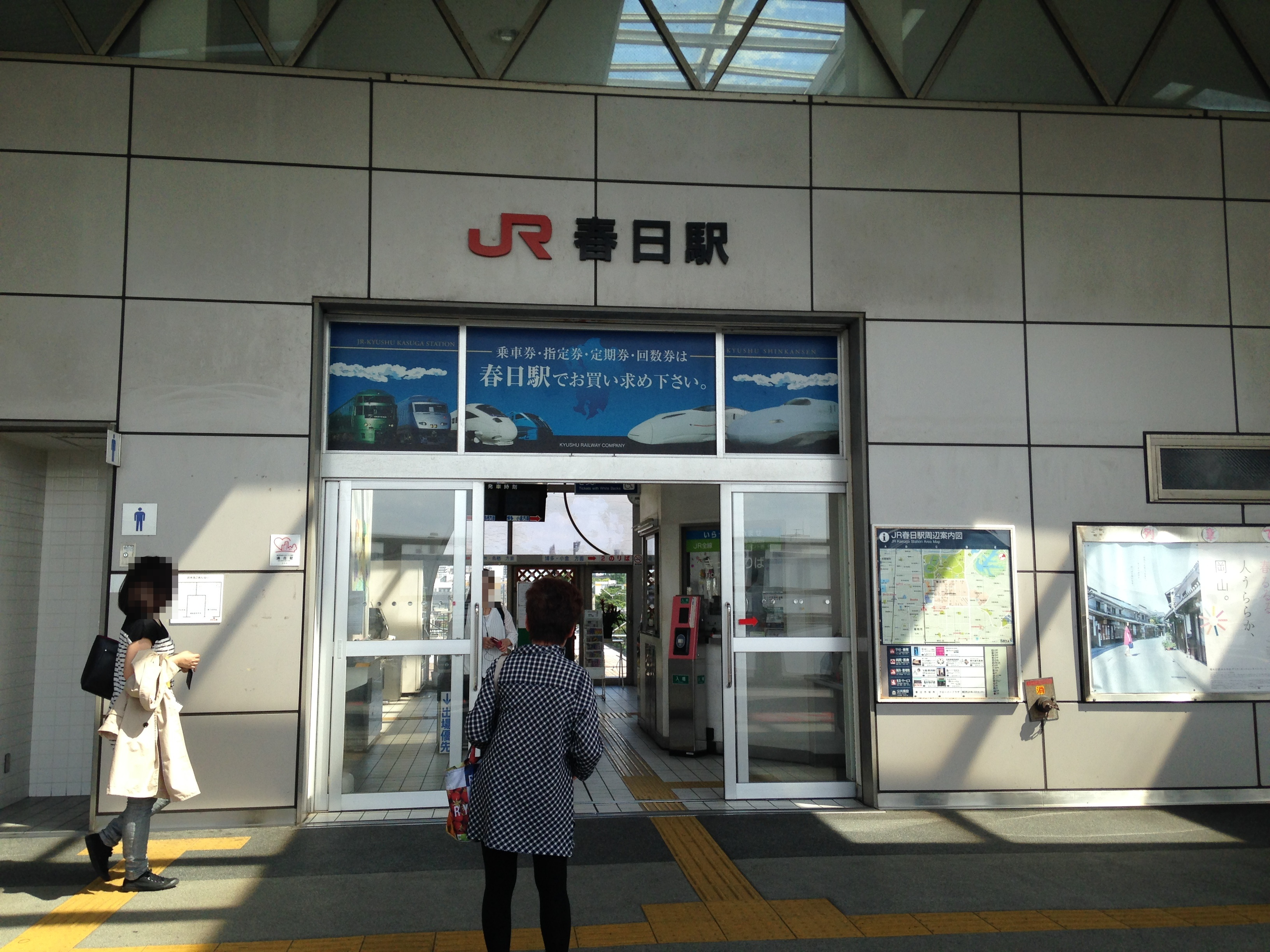 春日駅(福岡県)の入り口